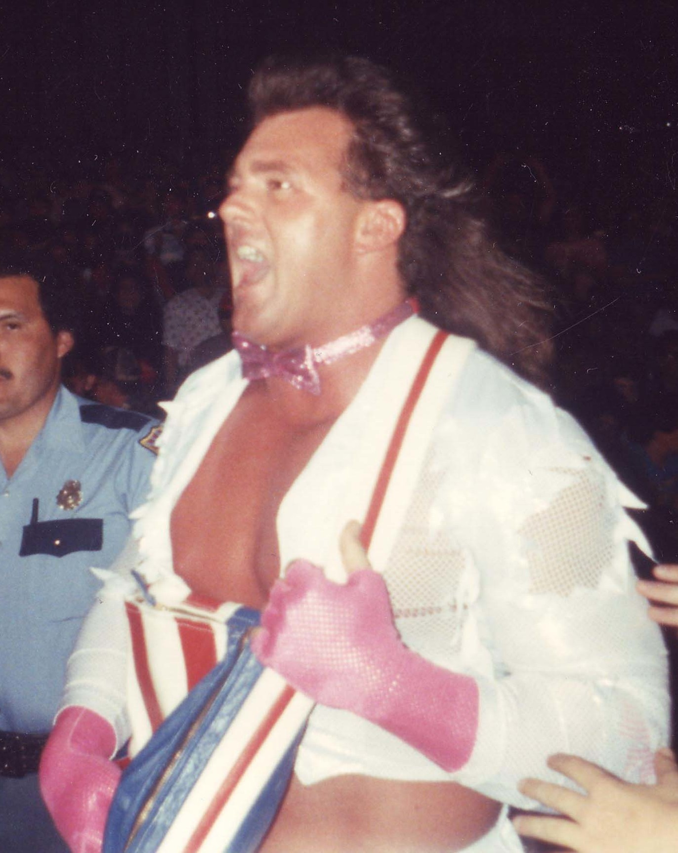 Brutus "The Barber" Beefcake